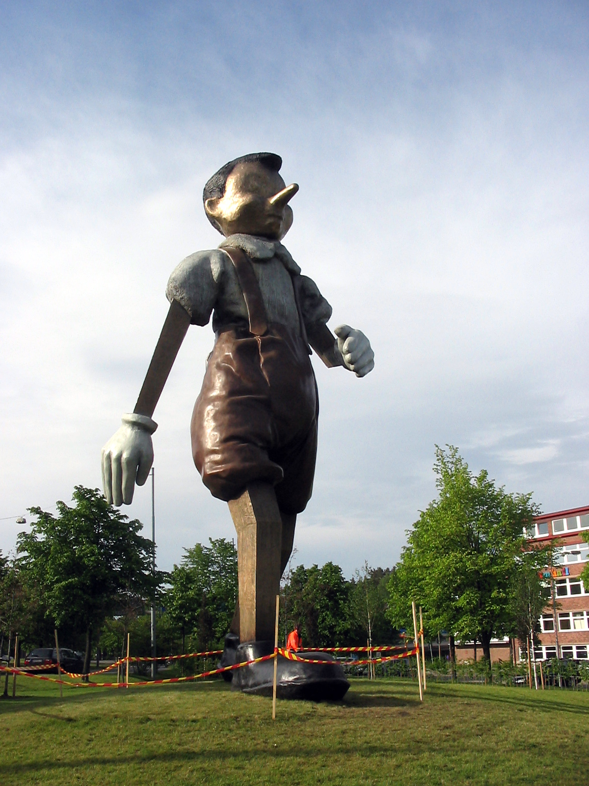 Bronze Pinocchio Statue by Jim Dine in Borås/Sweden